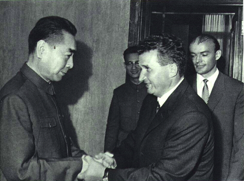 1966-10 1966年周恩来访问罗马尼亚-齐奥塞斯库